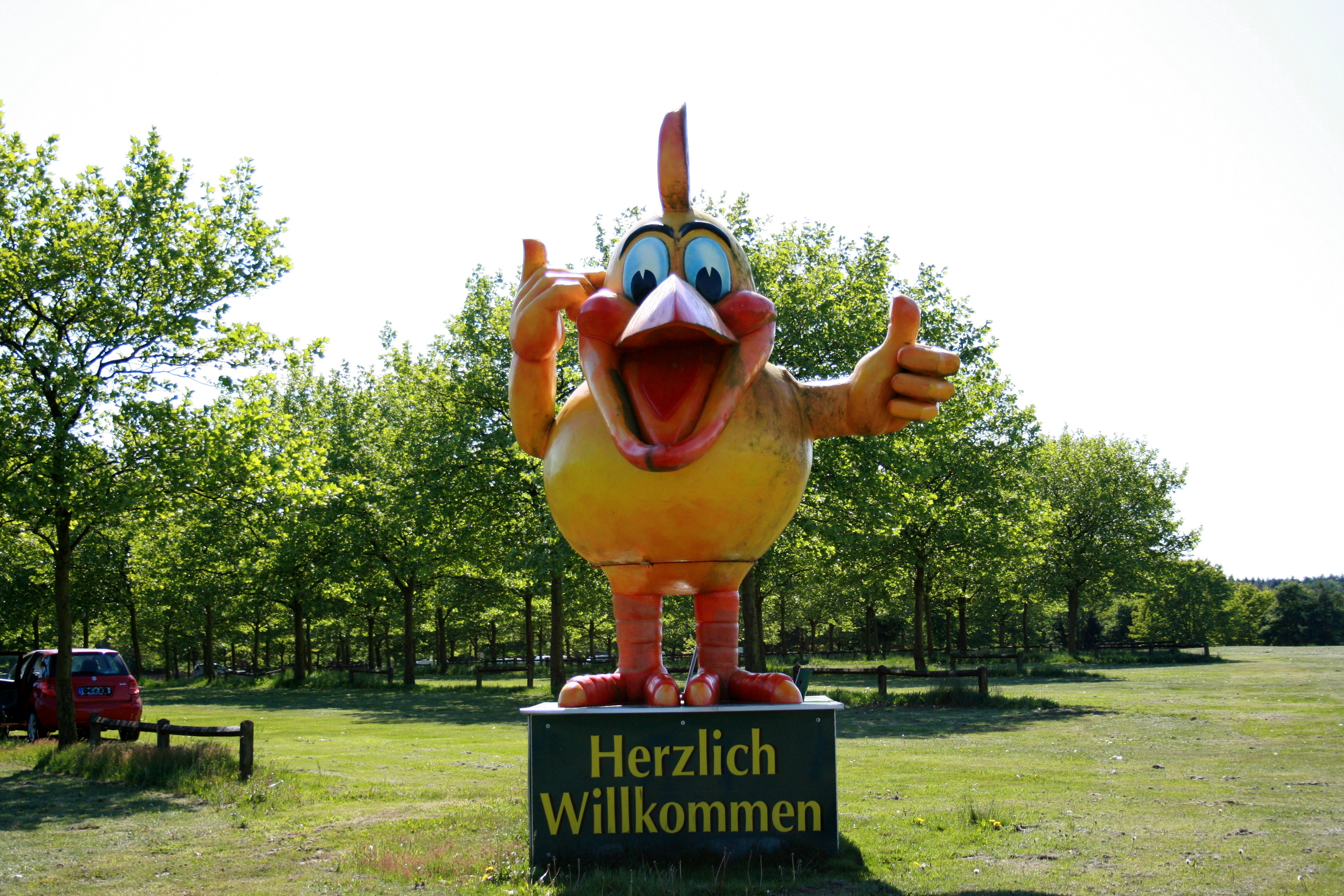 Vogelpark Walsrode, Parkplatz / Eingang